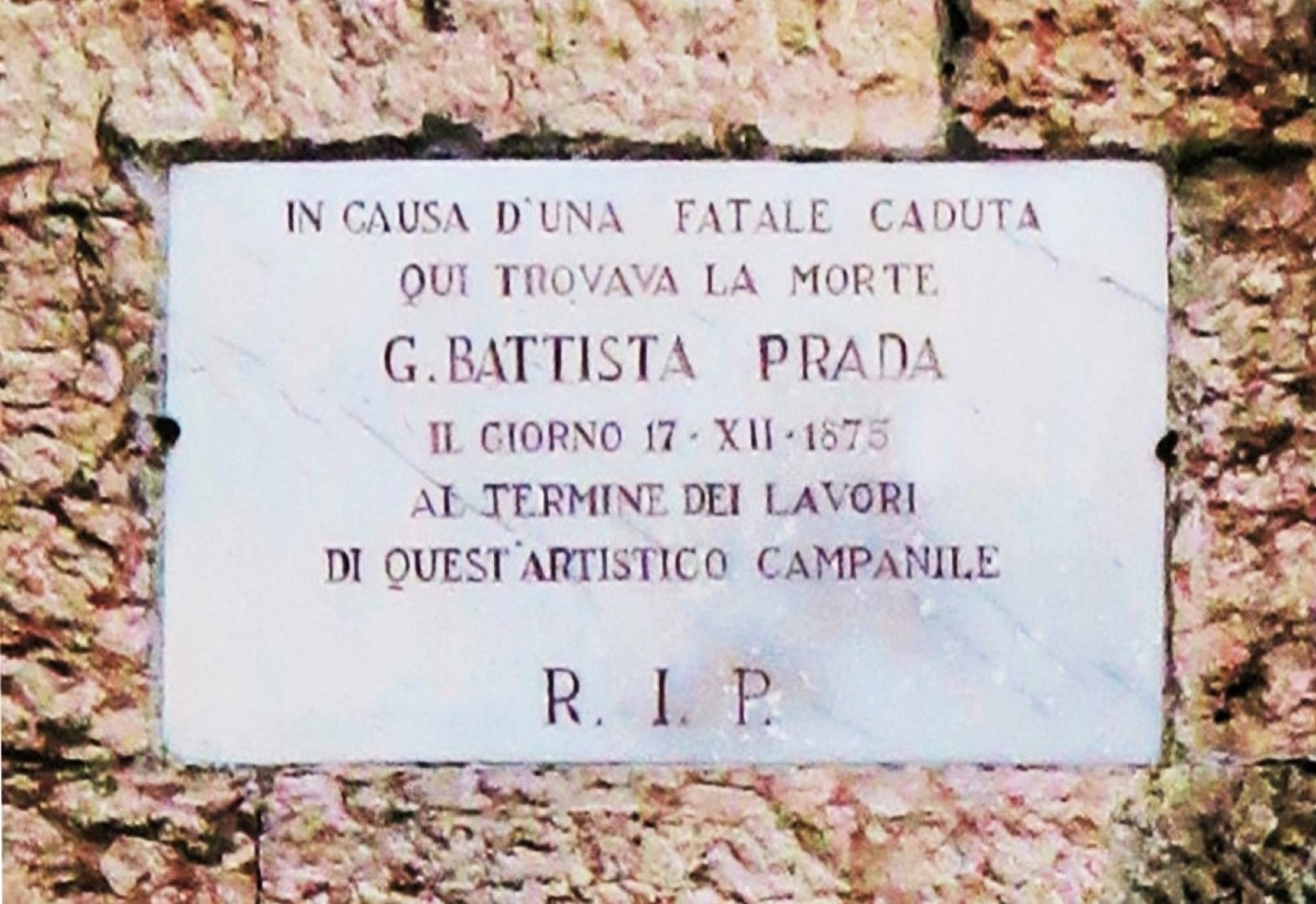 Chiesa di San Modesto, Aldeno. Campanile con targa che ricorda G. Battista Prada, caduto durante le ultime fasi della costruzione del campanile.